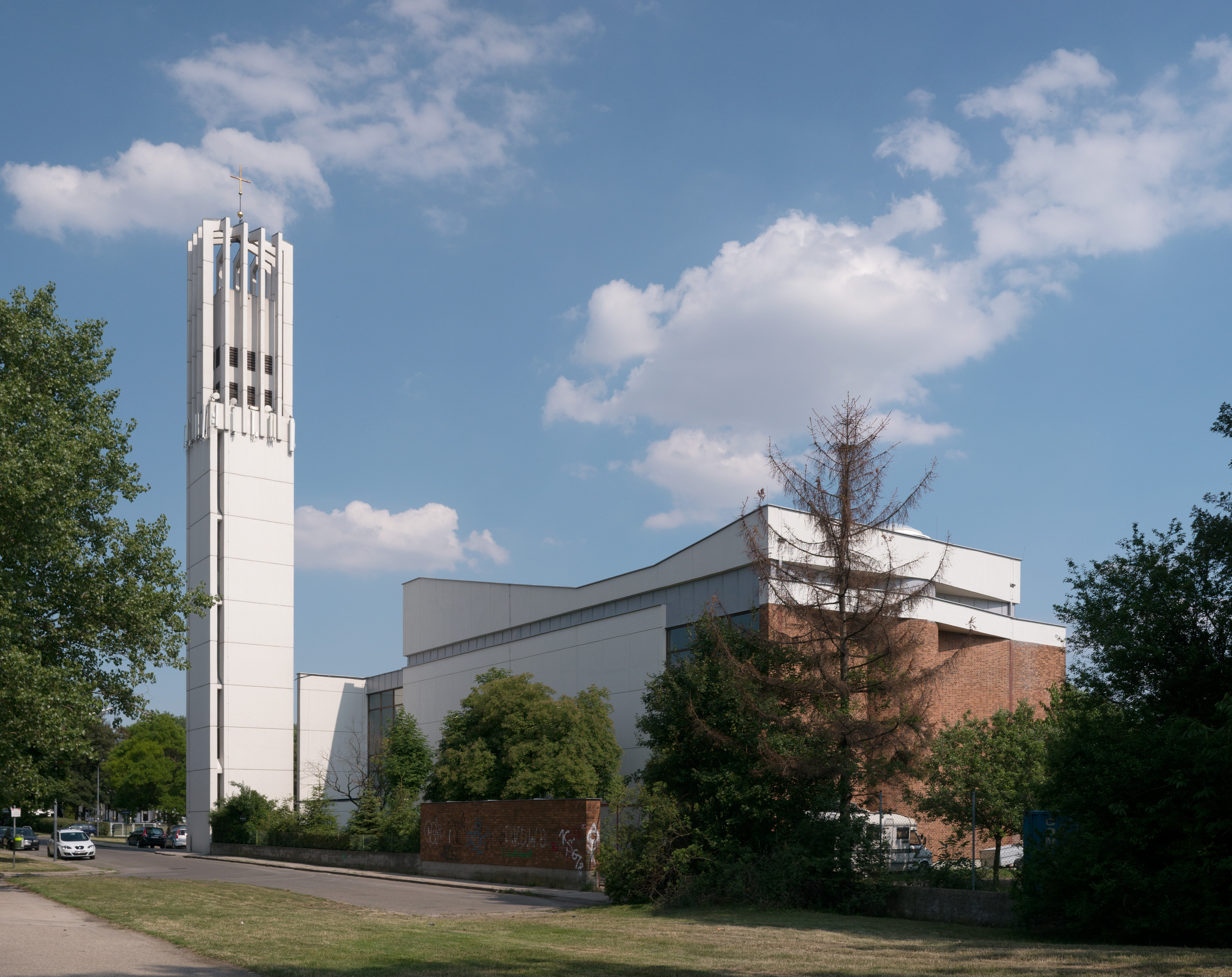 Pfarrkirche zum heiligen Franz von Sales Nordost